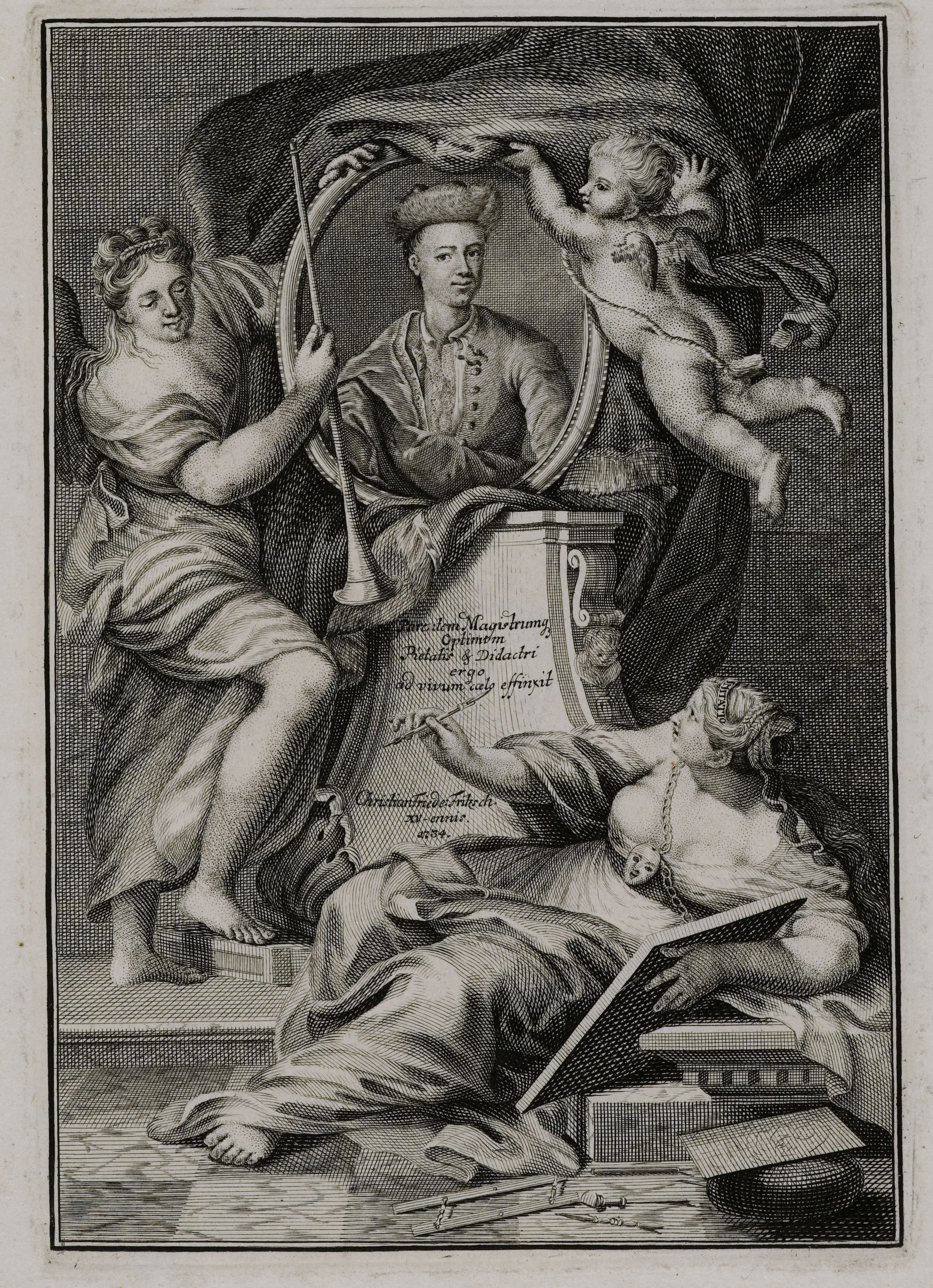 Kupferstich von dem 15jährigen Christian Friedrich Fritzsch mit dem Porträt seines Vaters und Lehrmeisters im Kupferstechen Christian, Hamburg 1734. Das Bildnis wird von einer allegorischen Figur links (evtl. Fama) gehalten, während ein Putto rechts den Vorhang beiseite schiebt, um das Porträt des Künstlers freizugeben. Am Fuße des Porträtsockels liegt die personifizierte Imitatio mit den Werkzeugen des Kupferstechers, der quasi lebende Personen in seinen Bildern festhält.